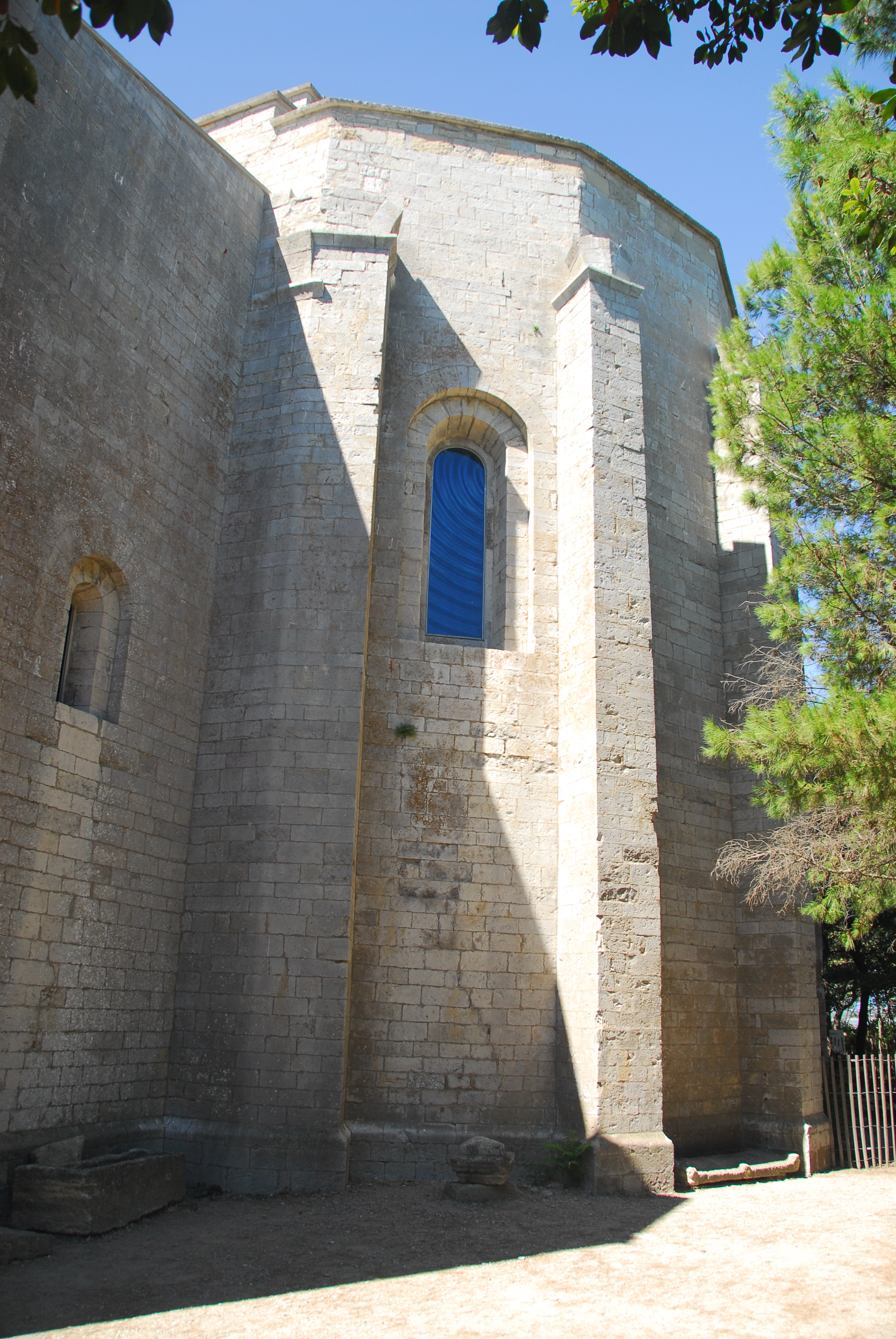 St-Pierre-et-St-Paul de Maguelone, Chorapsis von S